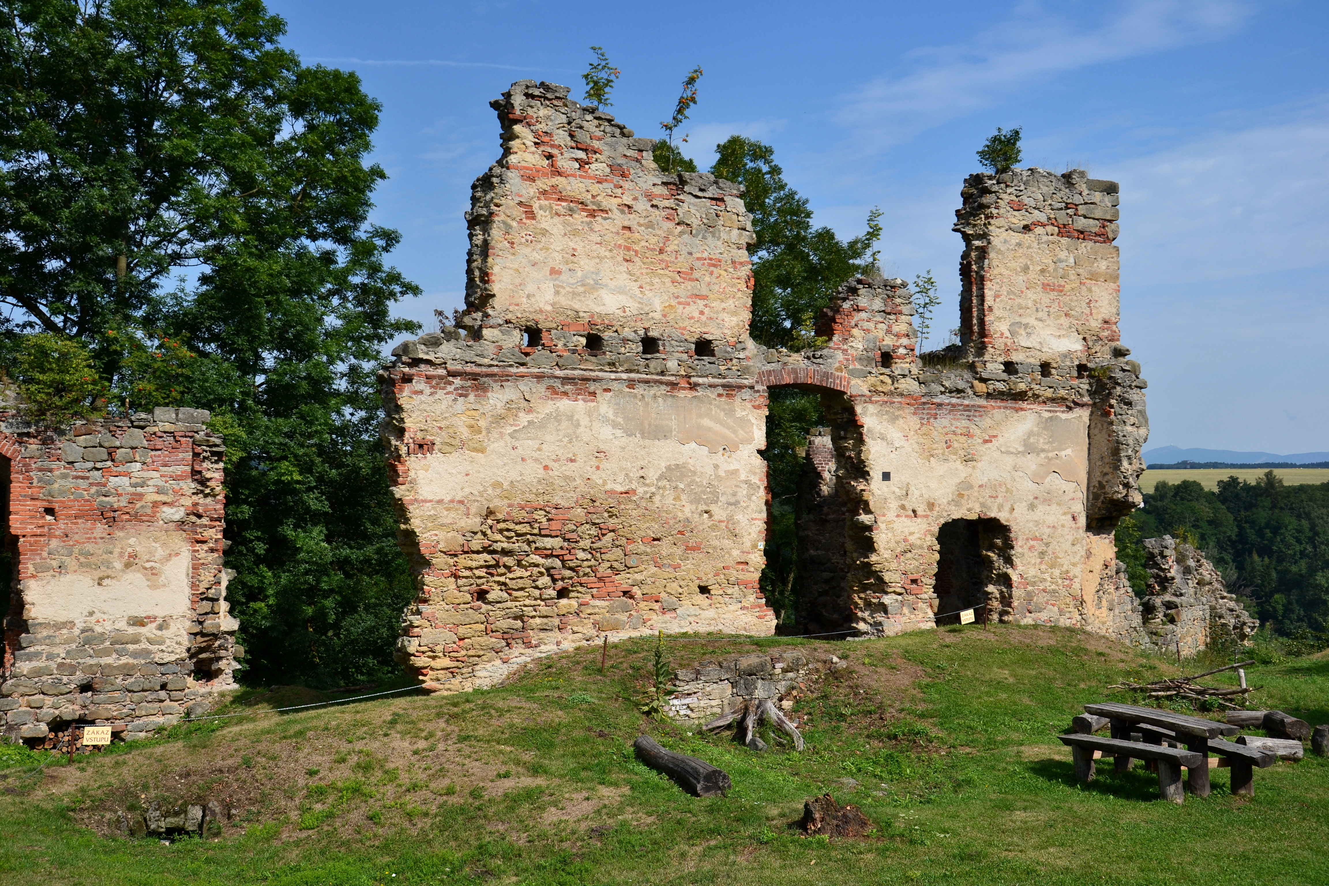 Nádvorní strana severního paláce, zámek Zásadka, severozápadní okraj vsi, Sychrov (Mnichovo Hradiště).